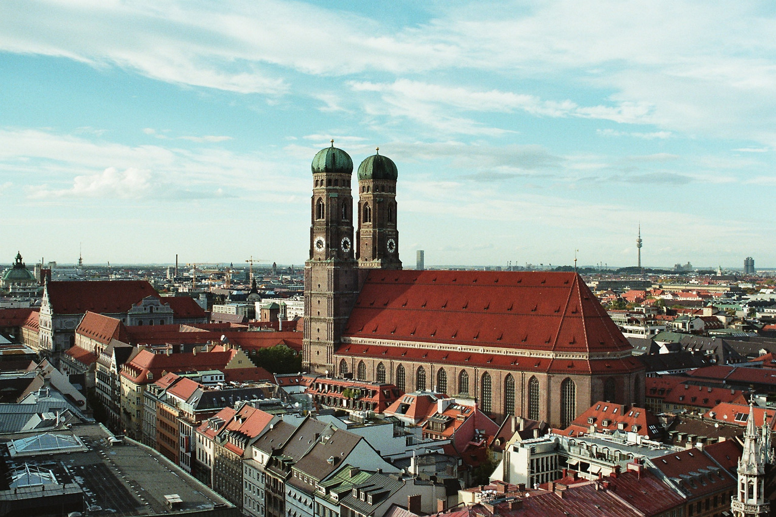 München, Frauenkirche vom Turm der Sankt-Peter-Kirche aus gesehen This is a photograph of an architectural monument. 1